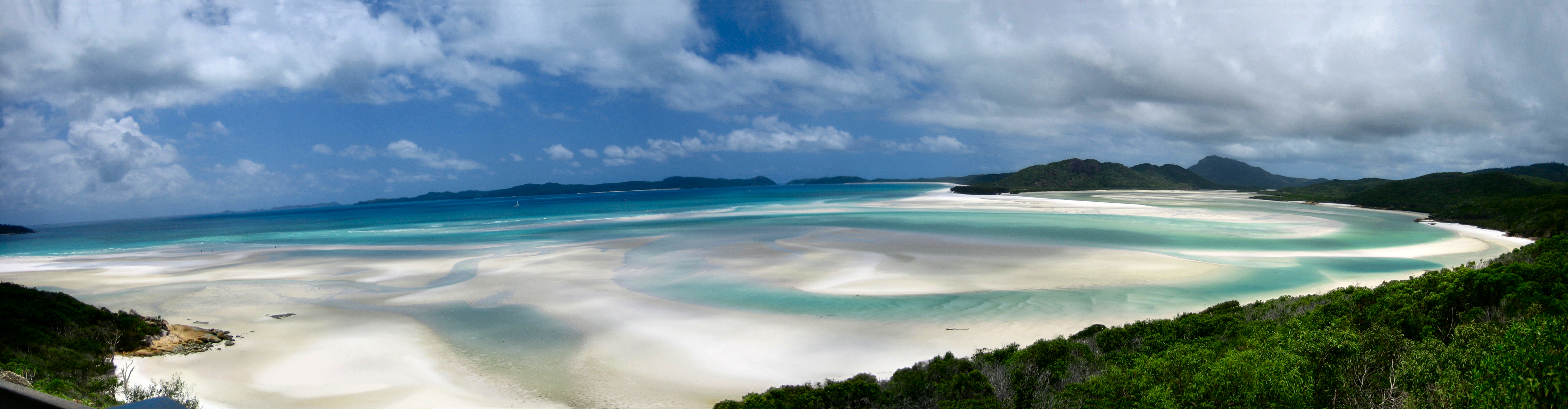 Plage Whitehaven sur la Whitsunday island (Queensland, Australie)